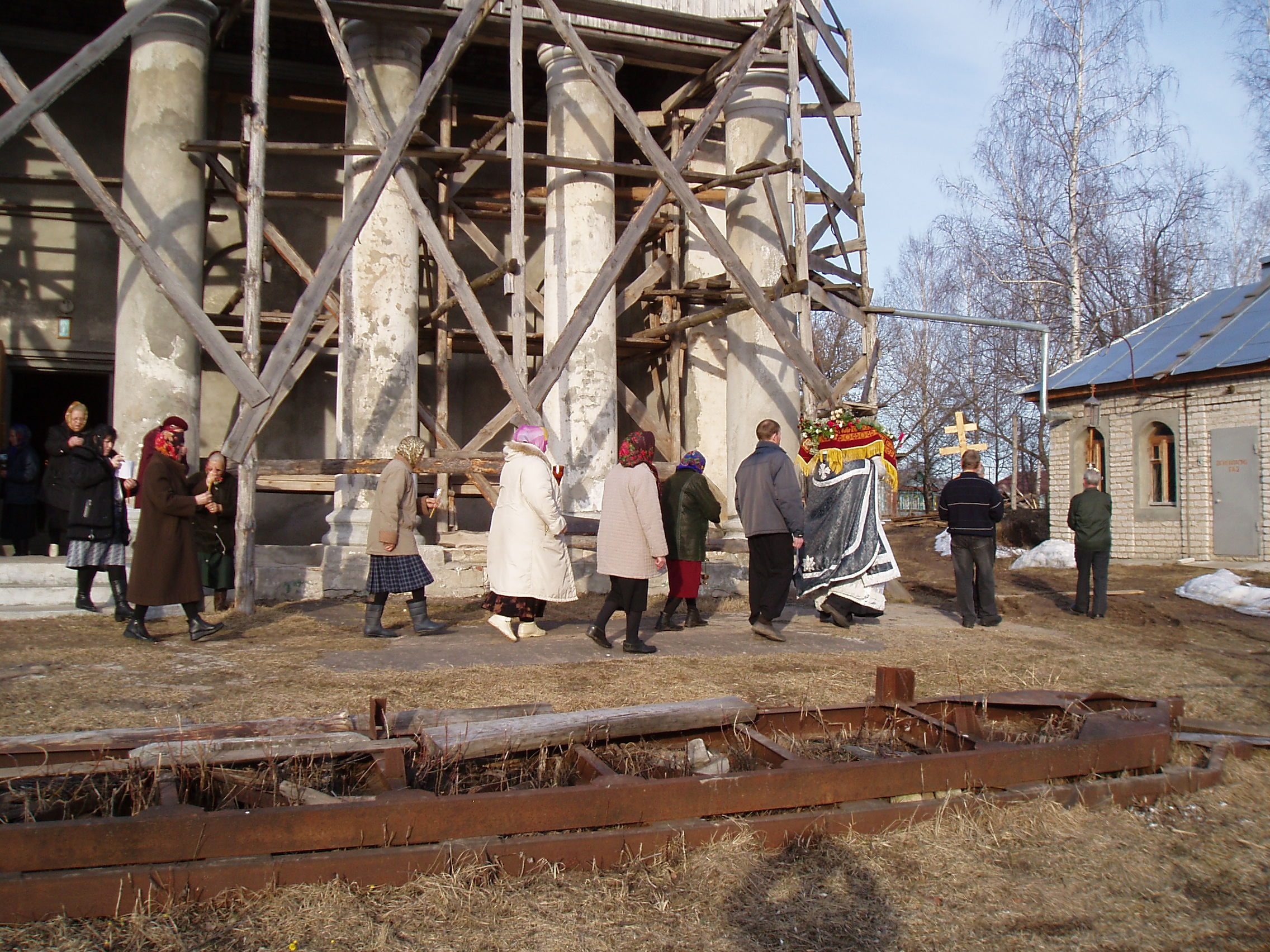 Утреня Великой Субботы. Крестный ход вокруг Церкви Покрова Пресвятой Богородицы в селе Дуденево